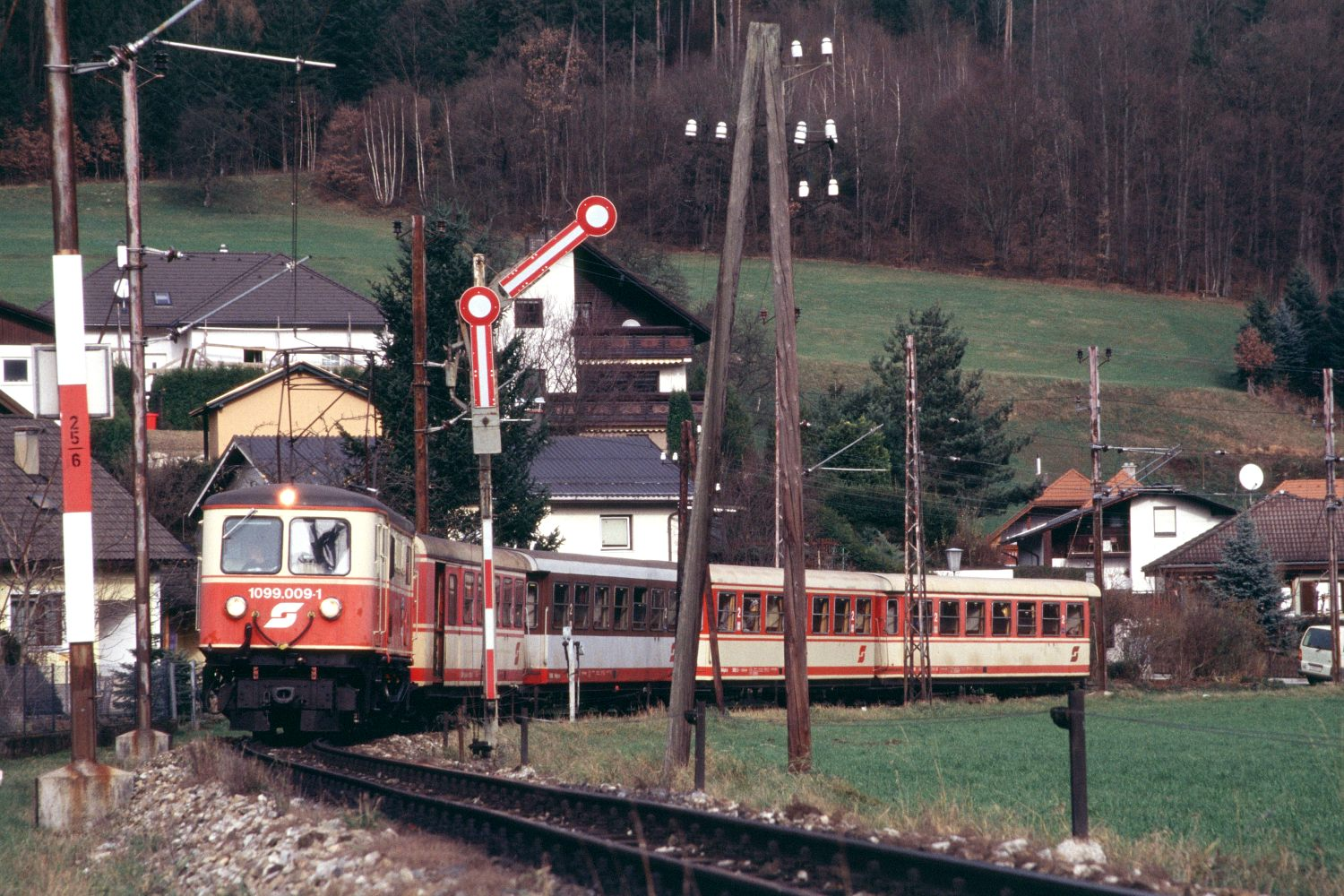 de: Ein Zug der Mariazellerbahn verlässt den Bahnhof Rabenstein an der Pielach auf dem Weg nach Mariazell, diesert Bahnhof ist noch mit Flügelsignalen ausgestattet. en: Train of the Mariazellerbahn leaving Rabenstein an der Pielach bound for Mariazell, this station is still equipped with semaphore signals.